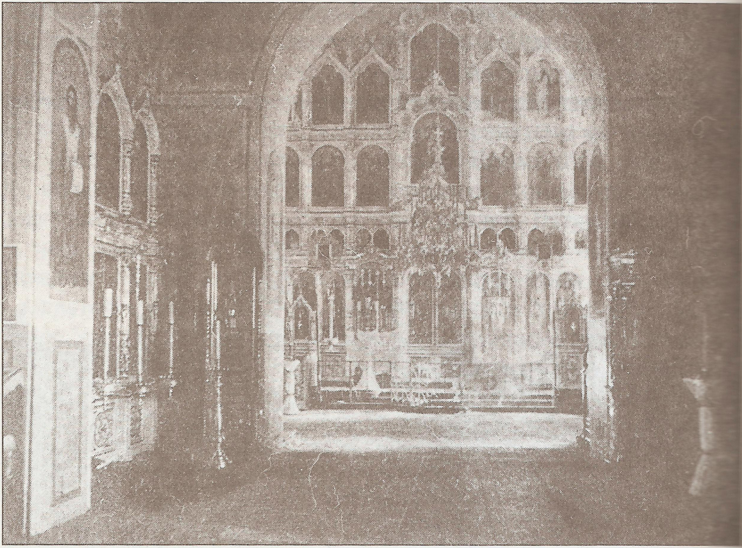 Казанский Головинский монастырь. Интерьер собора.